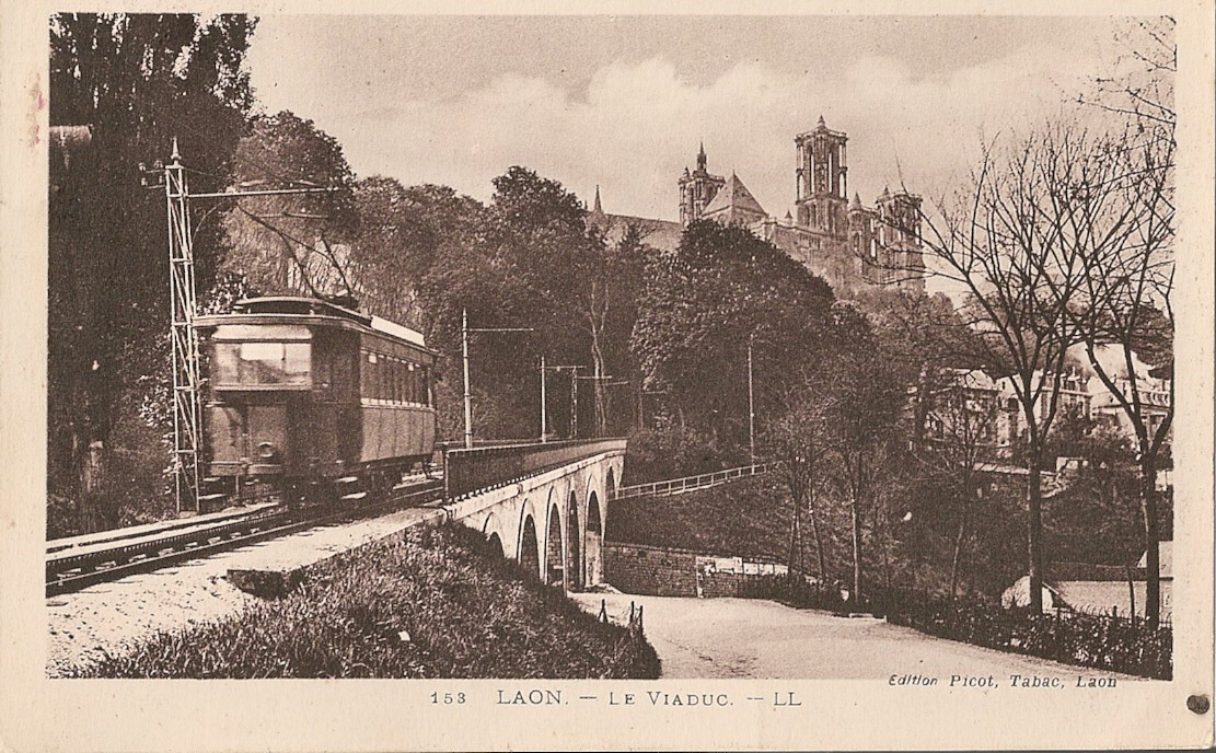 Carte postale ancienne éditée par LL, n°153 LAON : Le Viaduc